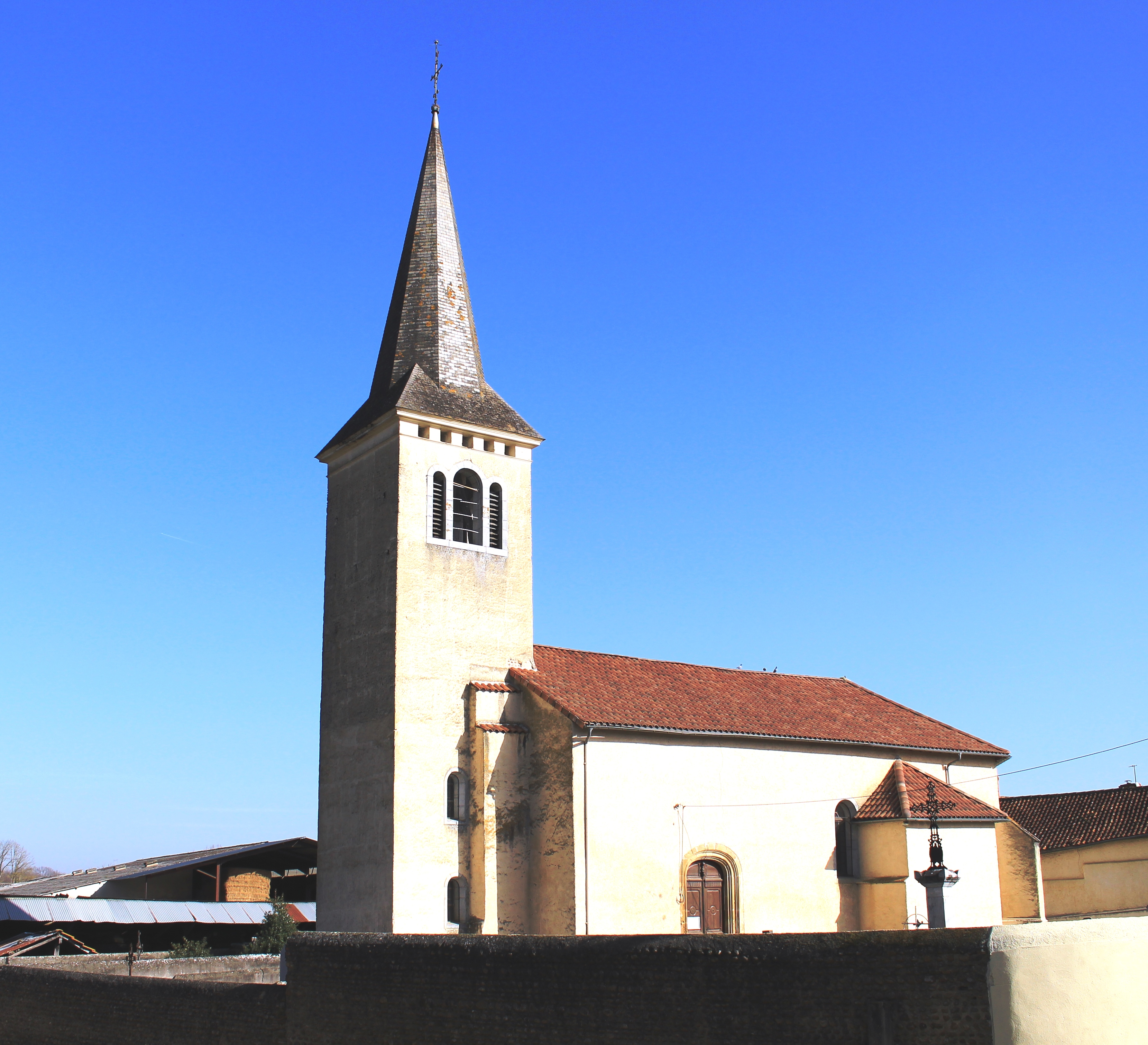 Église Saint-Germé de Laméac (Hautes-Pyrénées)